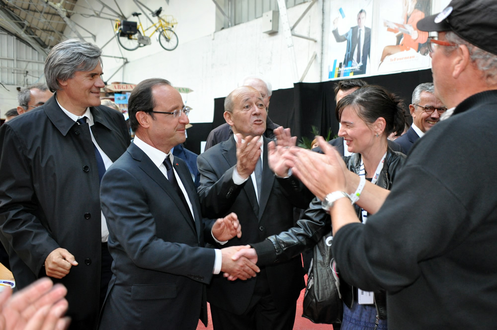 Gaelle Fily, animatrice de wiki-brest, serrant la main du président de la république française François Hollande lors de sa venue au Fourneau pendant les Tonnerres de Brest 2012